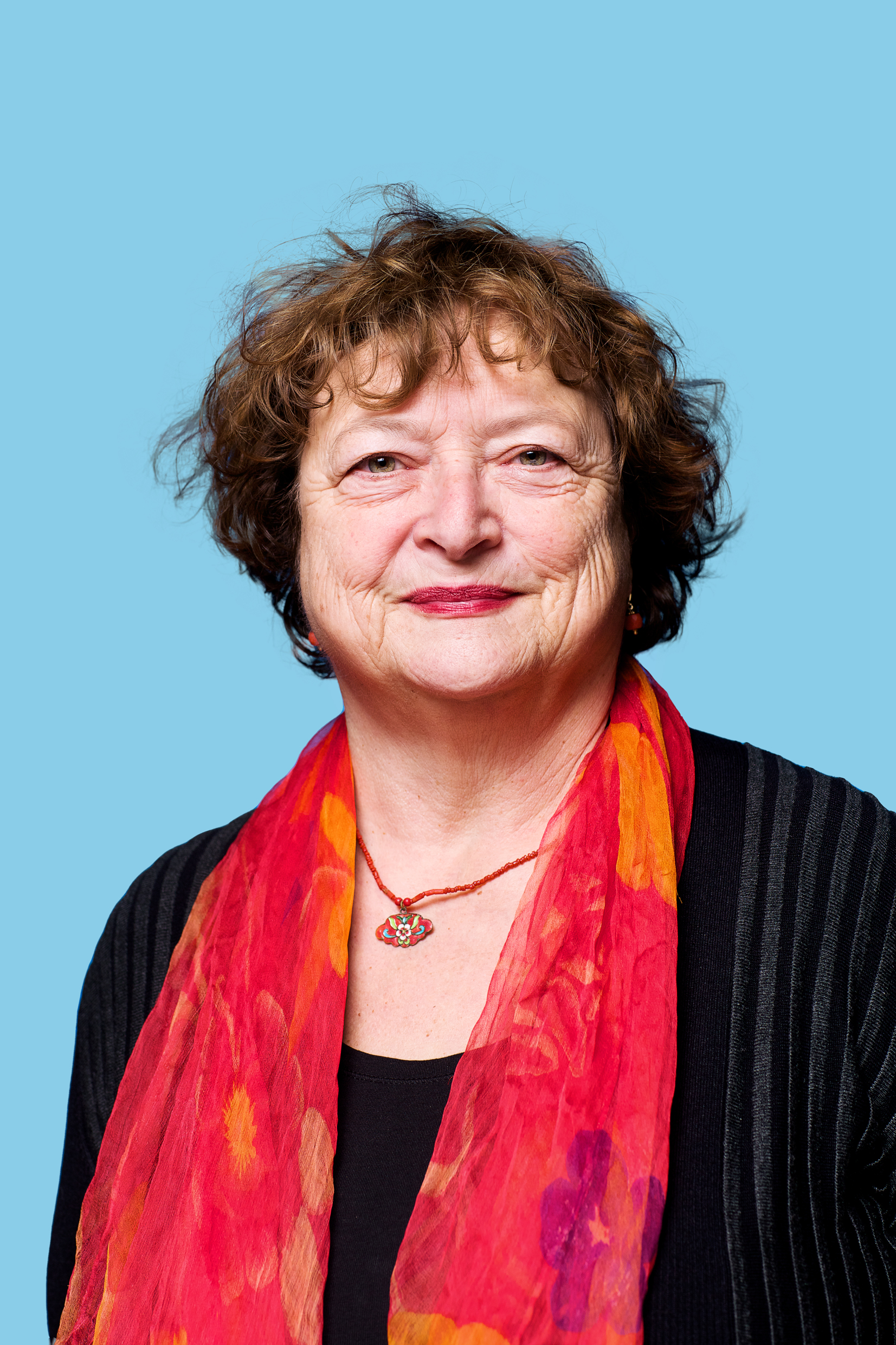 18 januari 2015. Kandidaat voor de Eerste Kamer. Op pvda.nl de volledige kandidatenlijst: bit.ly/1zpNRIG. Foto Lex Draijer.